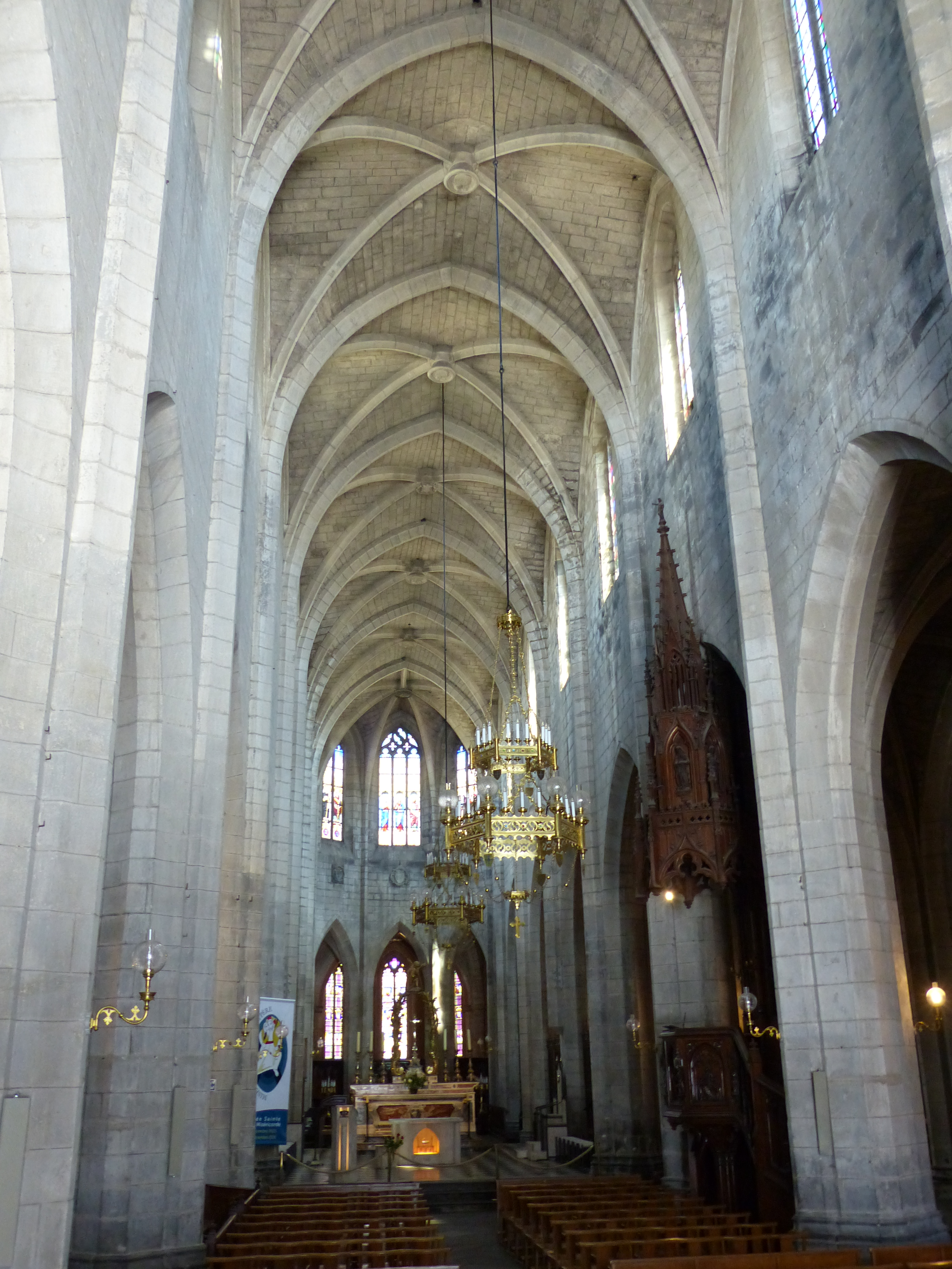 Cathédrale .